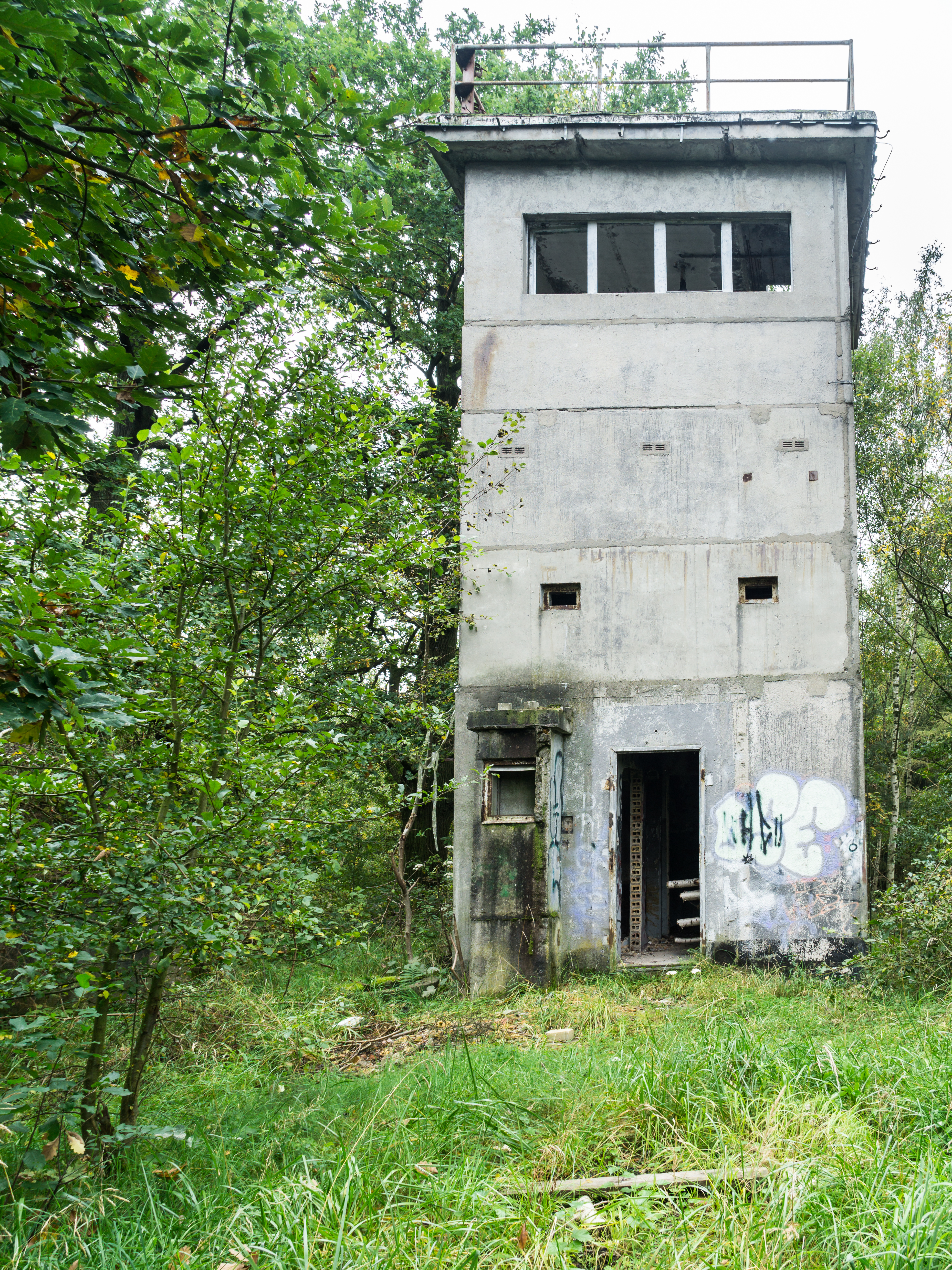 Grenzturm (Führungsstelle Döhren der 10. Grenzkompanie Weferlingen im III. Grenzbataillon im GR-23 als Beobachtungsturm BT-4x4) am Spellersieck westlich von Oebisfelde-Weferlingen OT Flecken Weferlingen